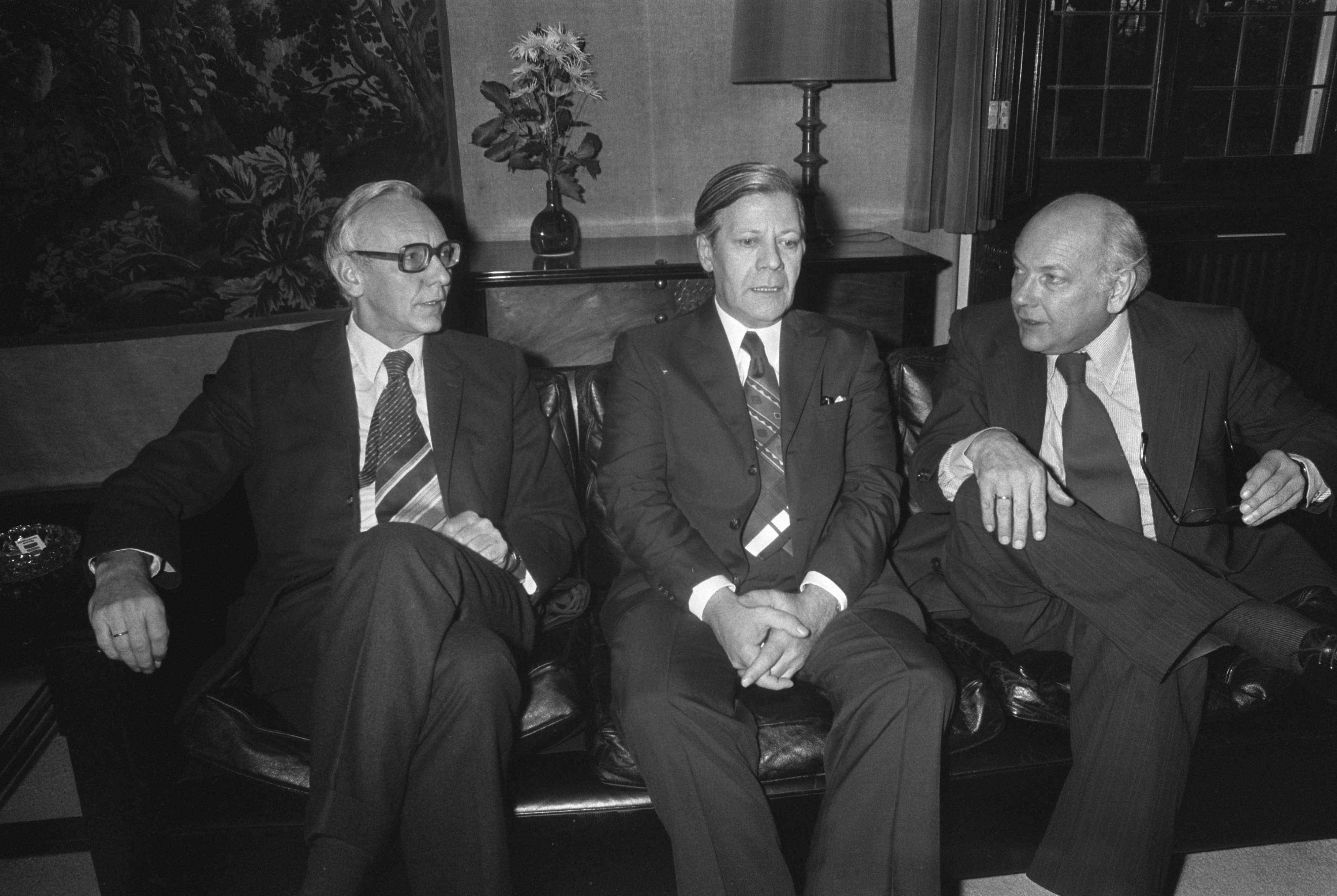 Collectie / Archief : Fotocollectie Anefo Reportage / Serie : [ onbekend ] Beschrijving : Premier Den Uyl (rechts) ontvangt op Catshuis bondskanselier Schmidt , links minister Van der Stoel Datum : 2 november 1974 Trefwoorden : ontvangsten Persoonsnaam : Stoel, Max van der, Uyl, Joop den Fotograaf : Peters, Hans / Anefo Auteursrechthebbende : Nationaal Archief Materiaalsoort : Negatief (zwart/wit) Nummer archiefinventaris : bekijk toegang 2.24.01.05 Bestanddeelnummer : 927-5566